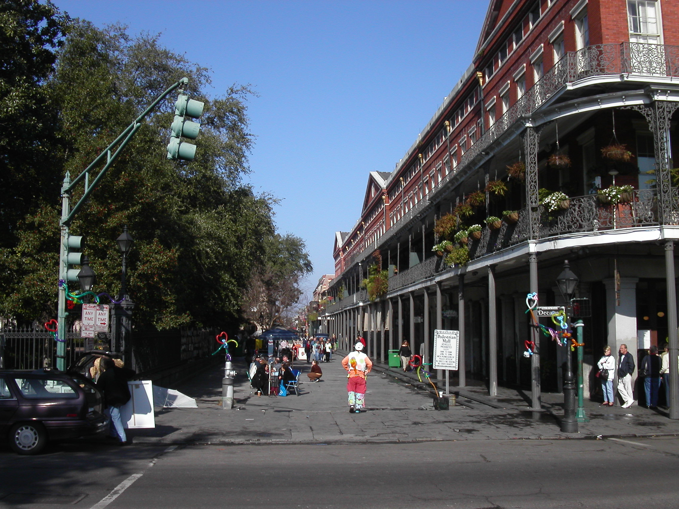 *rue touristique de La Nouvelle-Orléans Auteur : utilisateur:Marc Mongenet date : janvier-février 2003 Licence